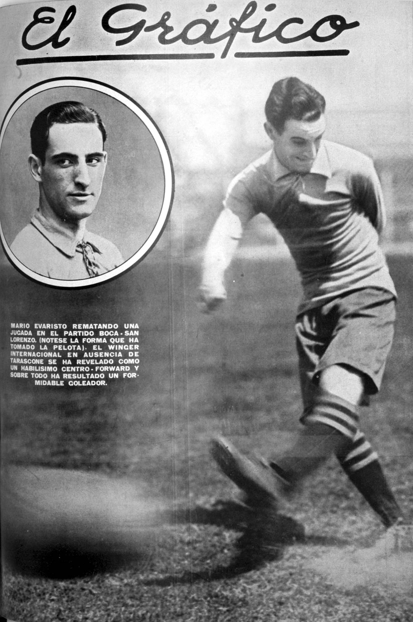 El Grafico del 25 de Enero de 1930. Edicion 550